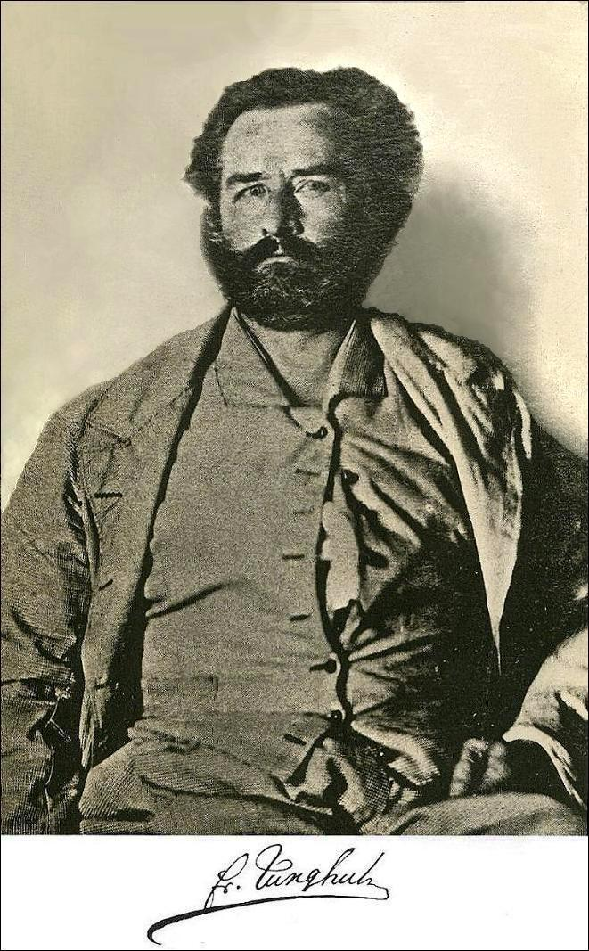 Franz Wilhelm Junghuhn im Jahr 1860